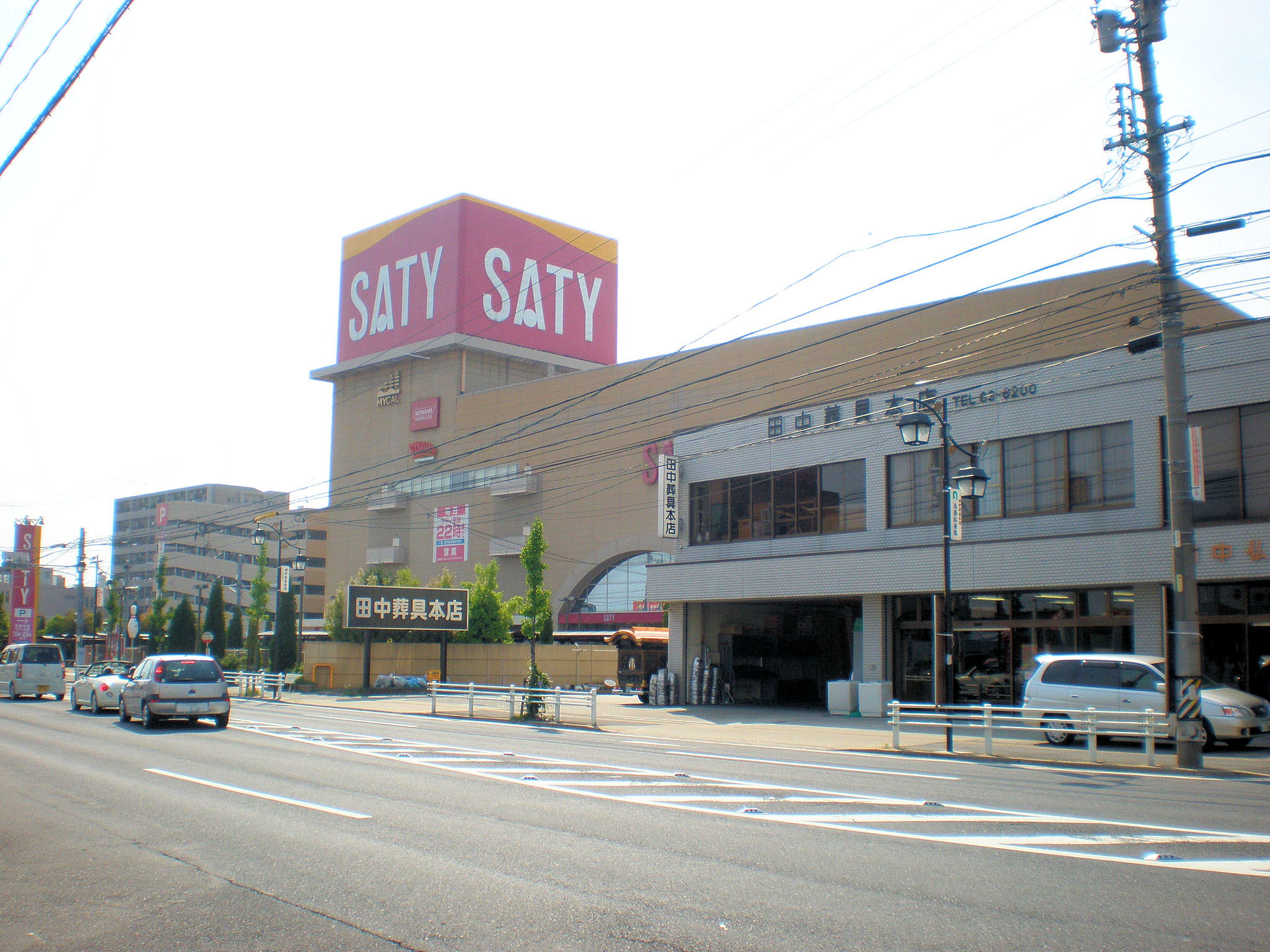 愛知県春日井市にある春日井SATY